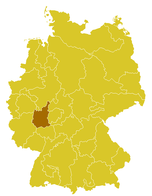 Beschreibung: Katholische Diözese/Bistum in Deutschland